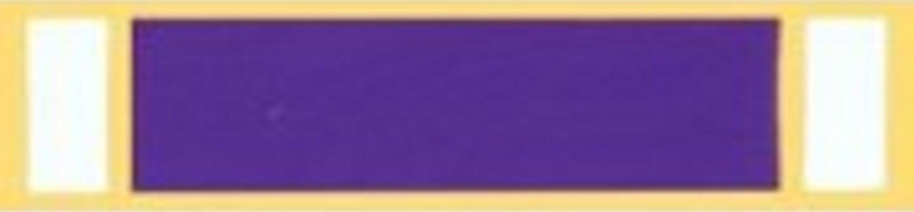 Purple Heart Medal Lapel Pin